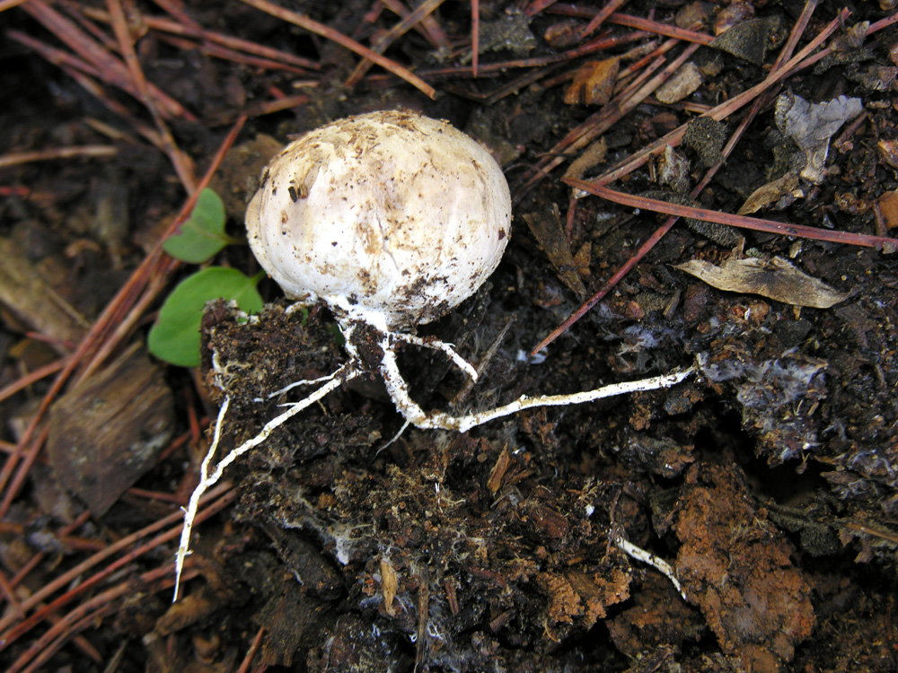 Clathrus ruber espezieak garatutako kordoi mizeliarra.